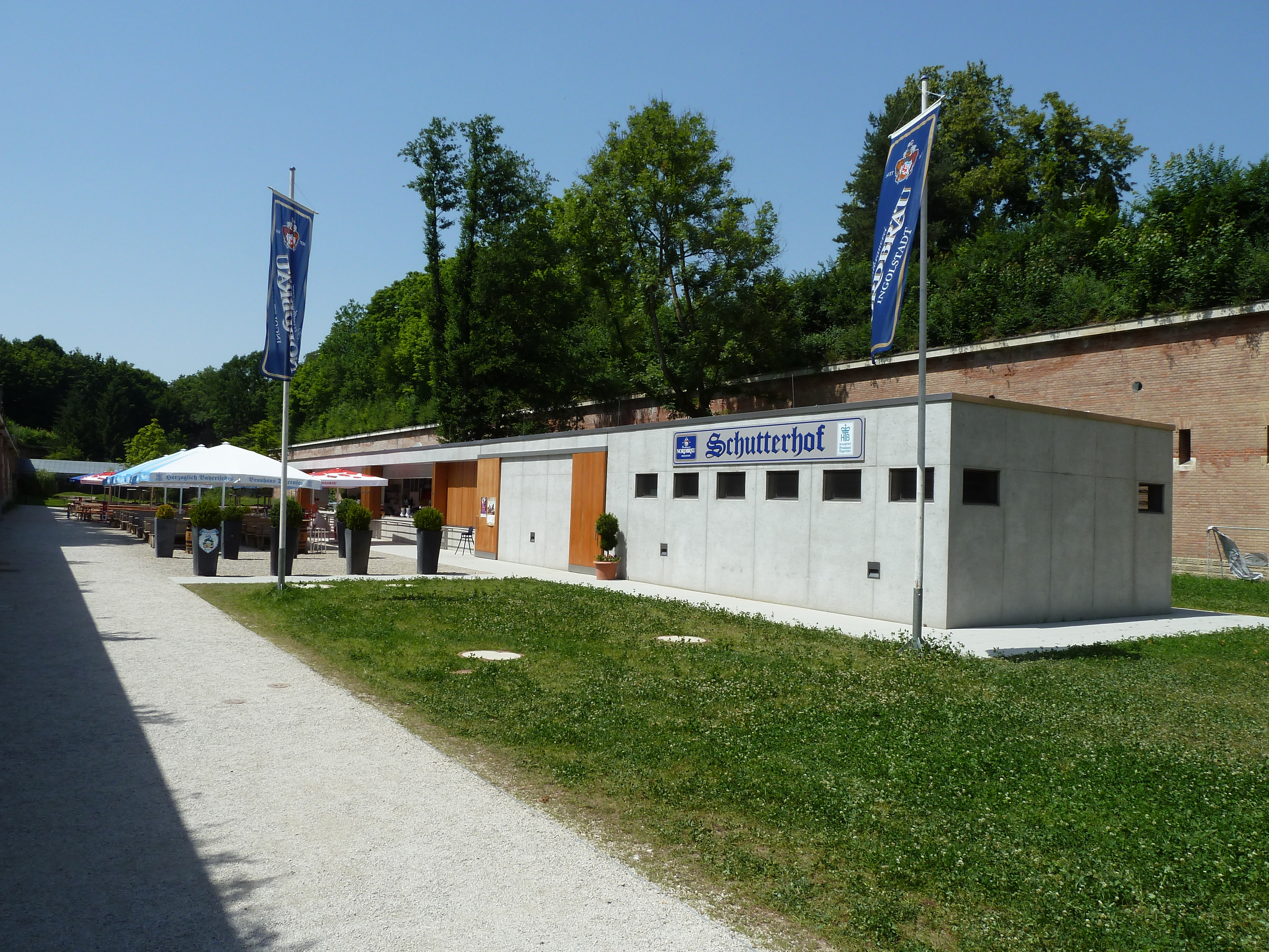 Biergarten im Schutterhof